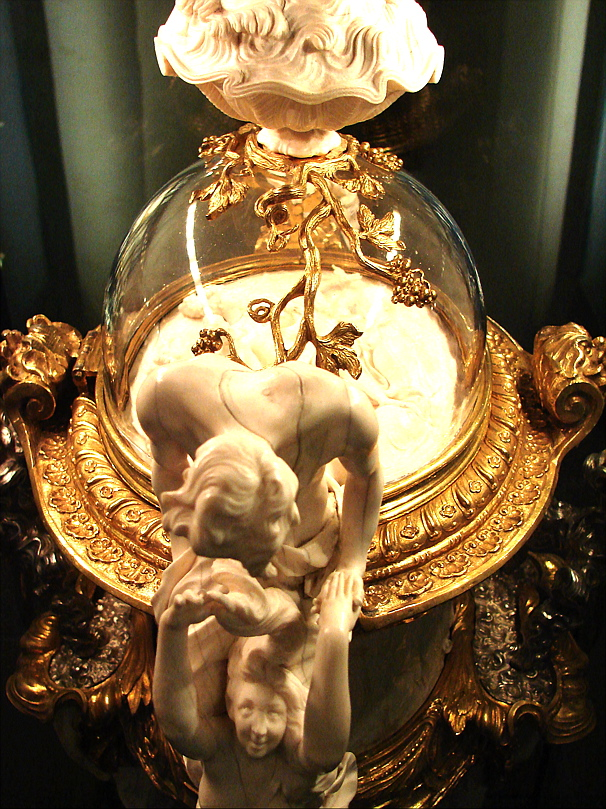 Detalje af «Vandet», Magnus Berg (1666—1739), pragtvase i bronce, elfenben og sølv udført i årene 1708—1723, Rosenborg Slot, København